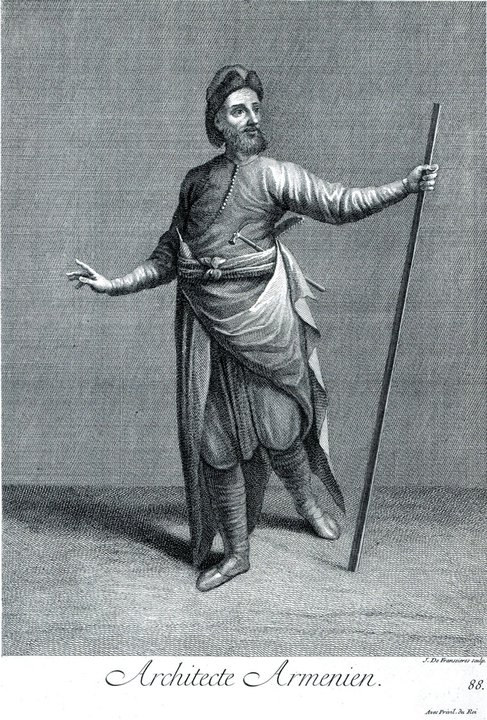 Армянский архитектор из Константинополя